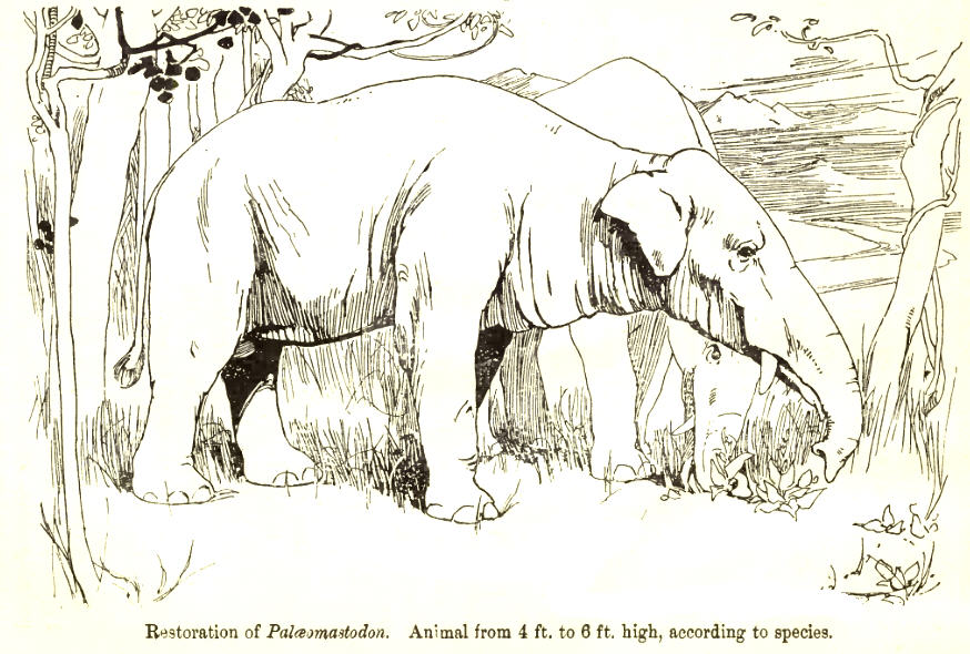 Paleomastodon restoration